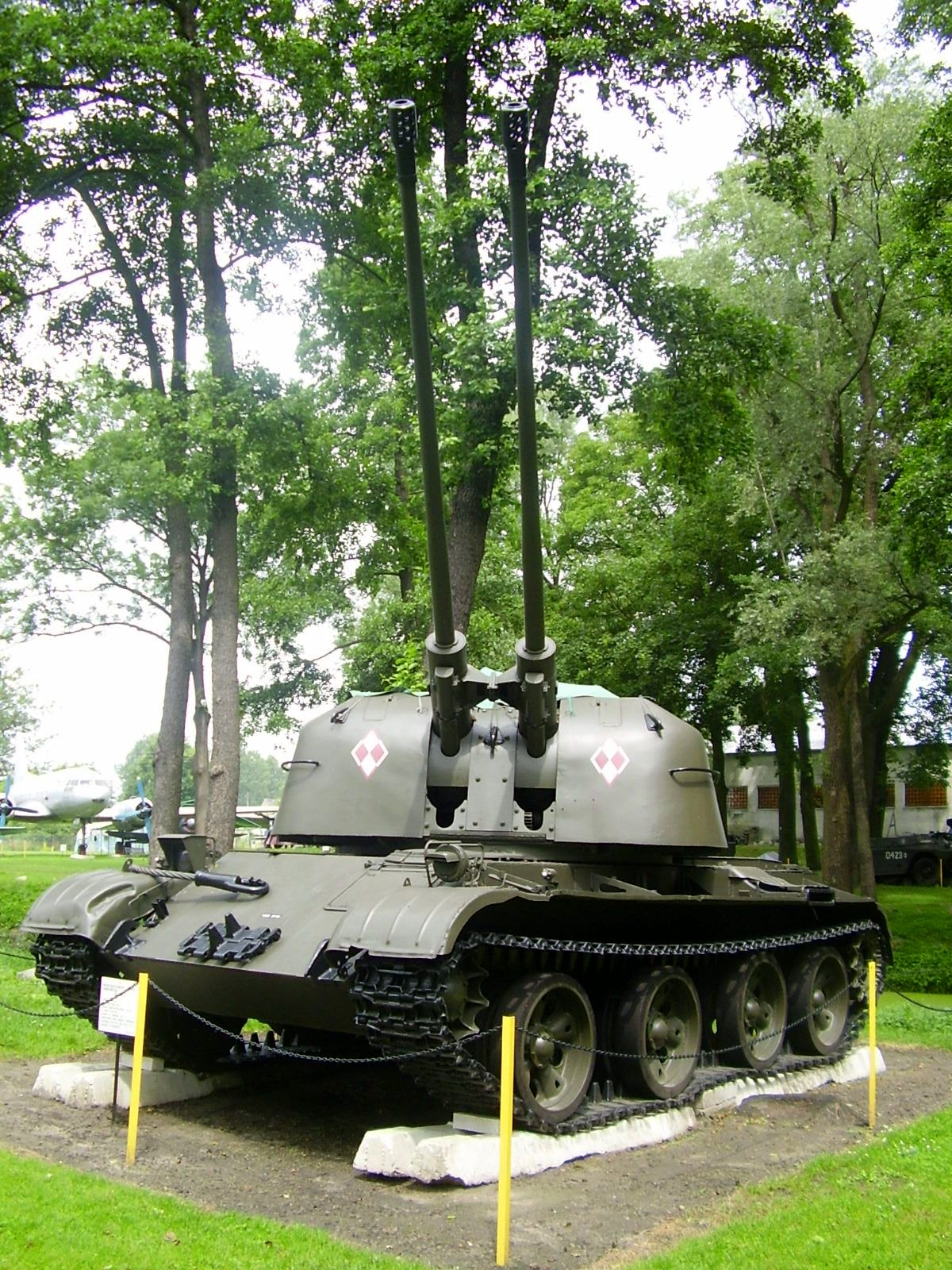 Przeciwlotnicze Działo Samobierzne ZSU-57-2